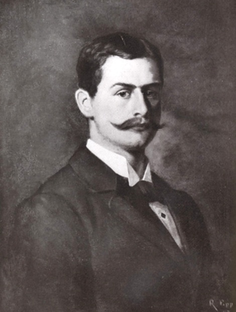 Franz Ritter von Epp (1868-1946) als junger Mann, gemalt von seinem Vater Rudolf Epp, 1893